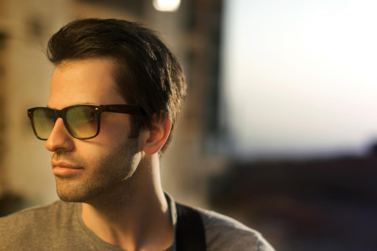 portrait of a handsome man with bokeh and shallow depth of field